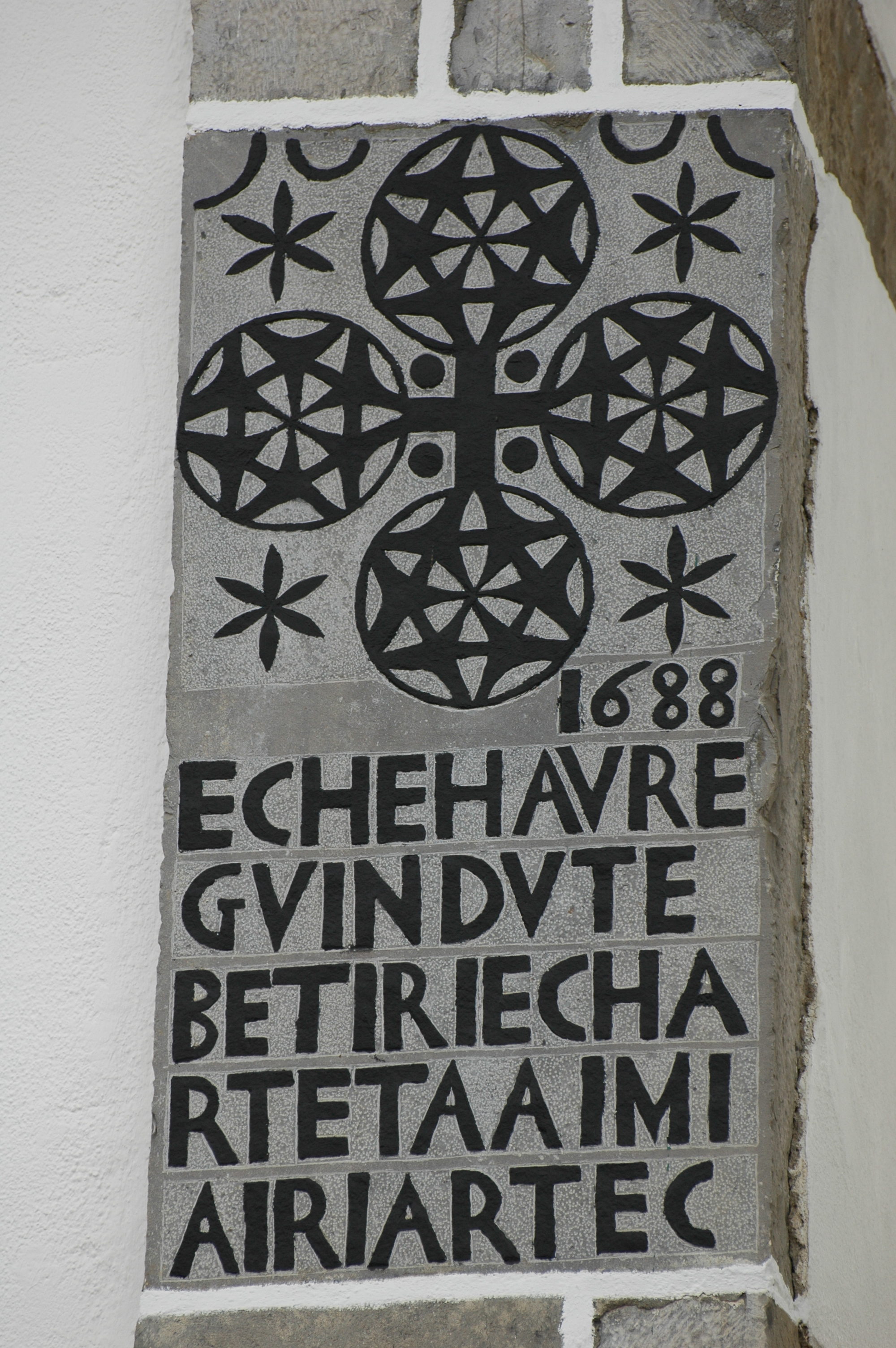 Armendarits, moëllon sculpté